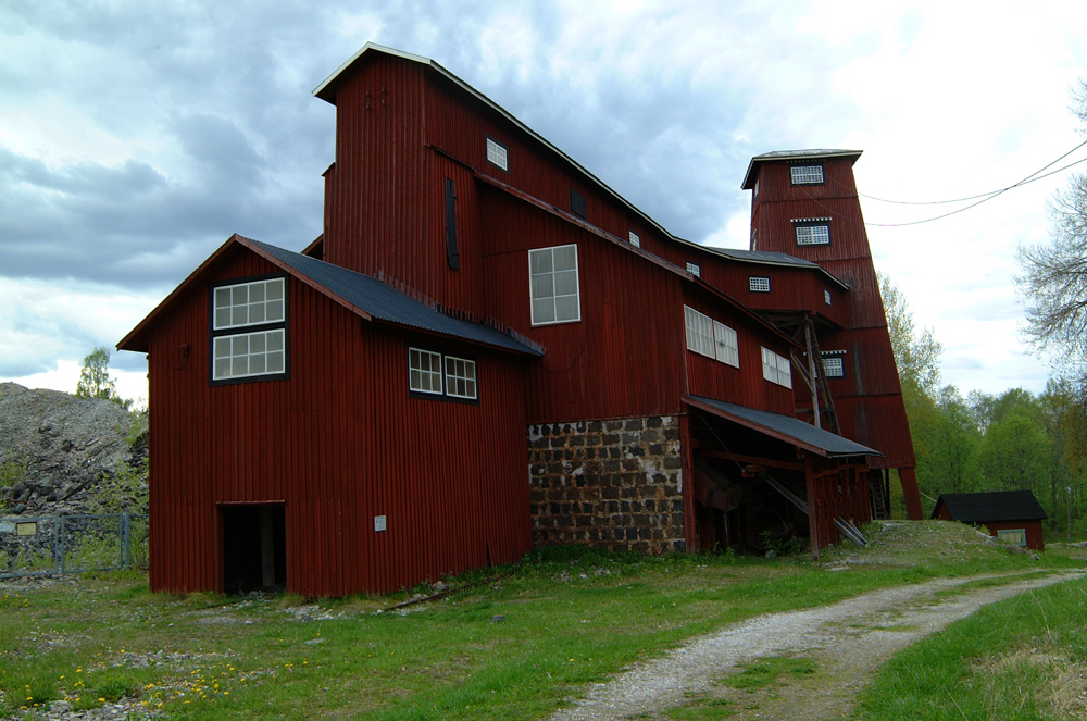 Långban, gruvan. Foto: Cucumber maj 2004.